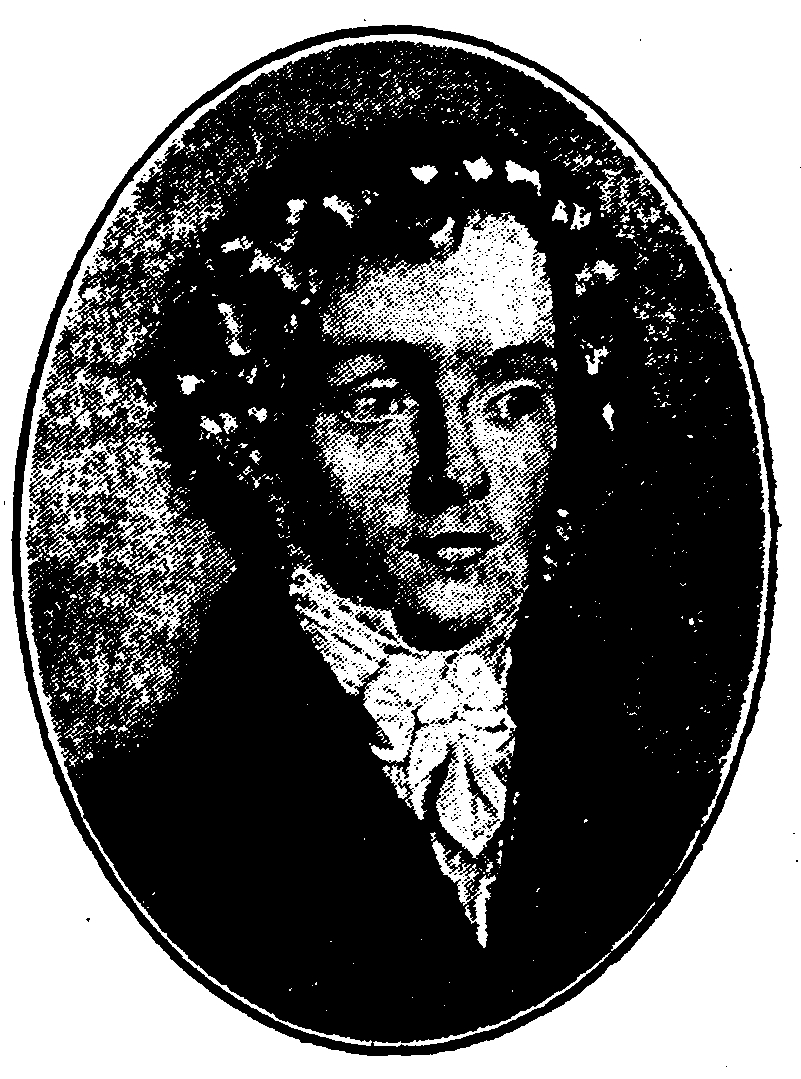 Ernst Wilhelm Hengstenberg (1802-69)